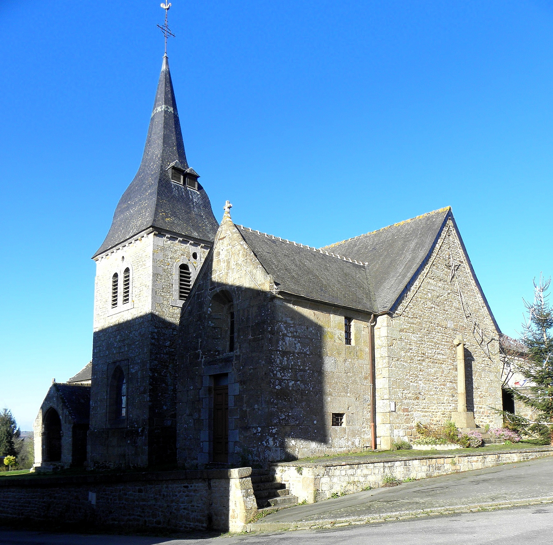 Église Saint-Pierre-et-Saint-Paul de Romazy (35). Chevet et flanc sud.